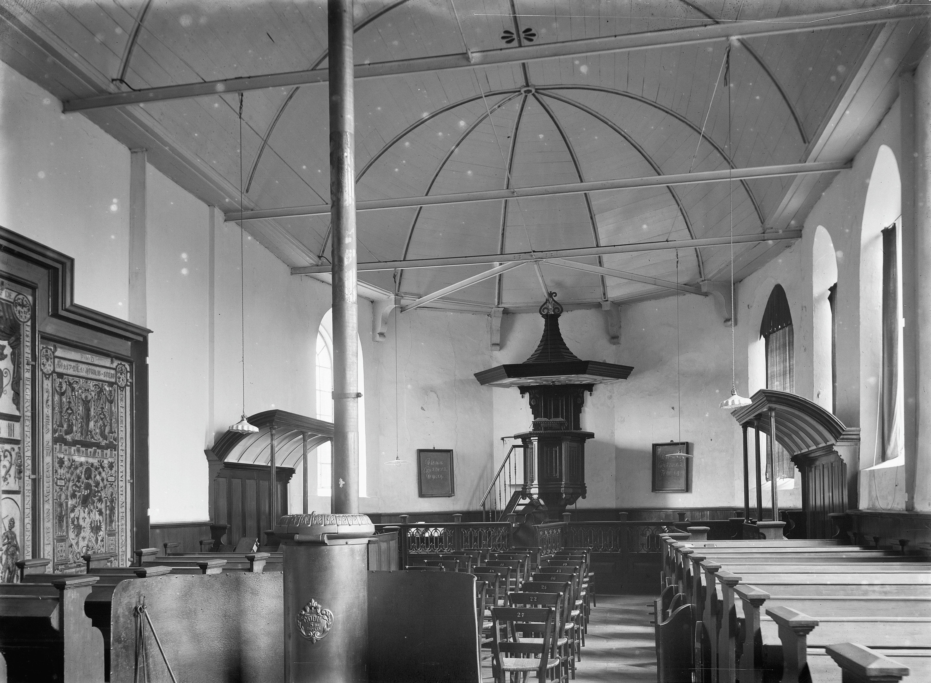 N.H.Kerk: interieur naar het noord-oosten (opmerking: Fotonummer 10360)